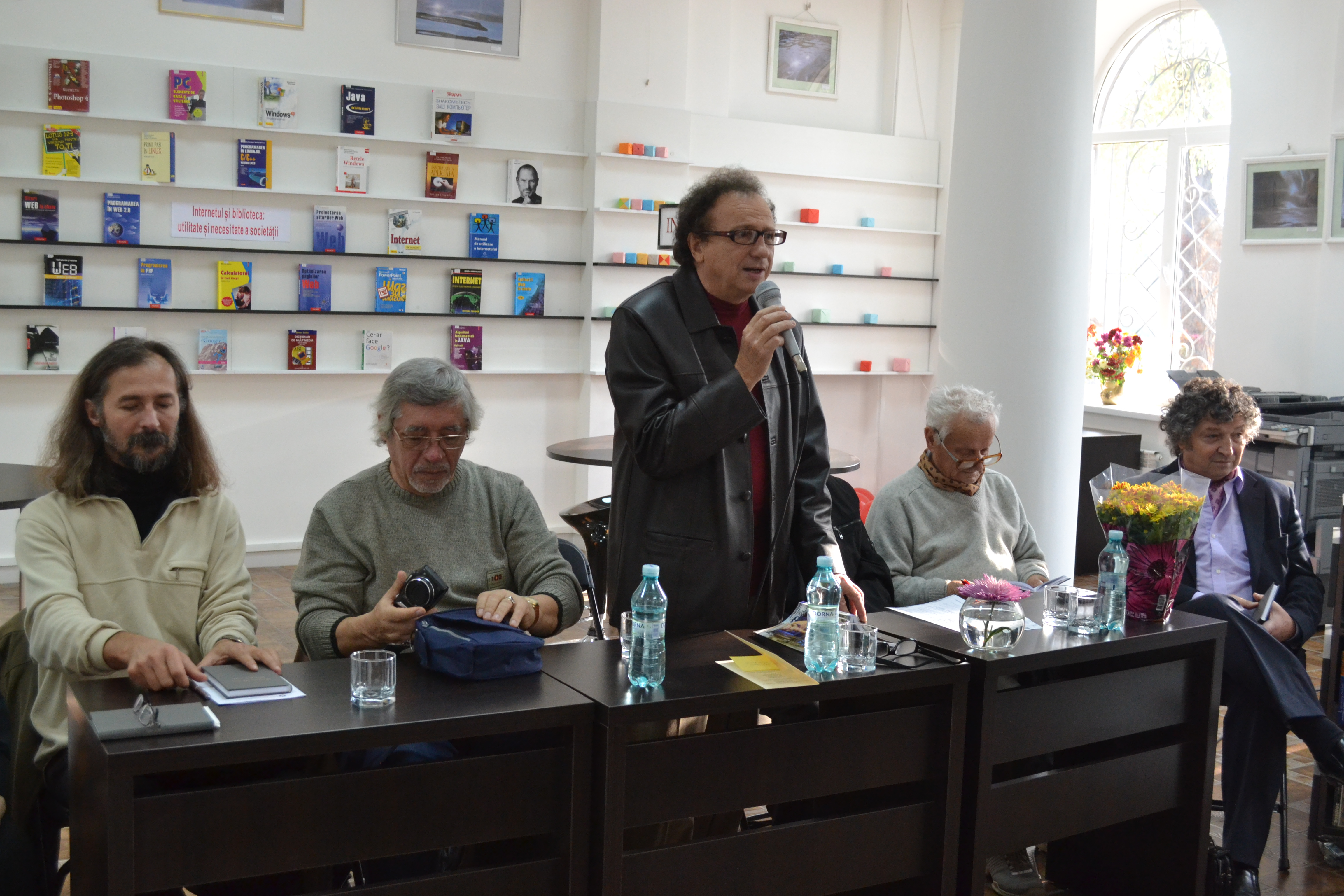 Moderatorul Arcadie Suceveanu, alături de Emilian Galaicu-Păun, Leo Butnaru, Vladimir Beșleagă și Iulian Filip